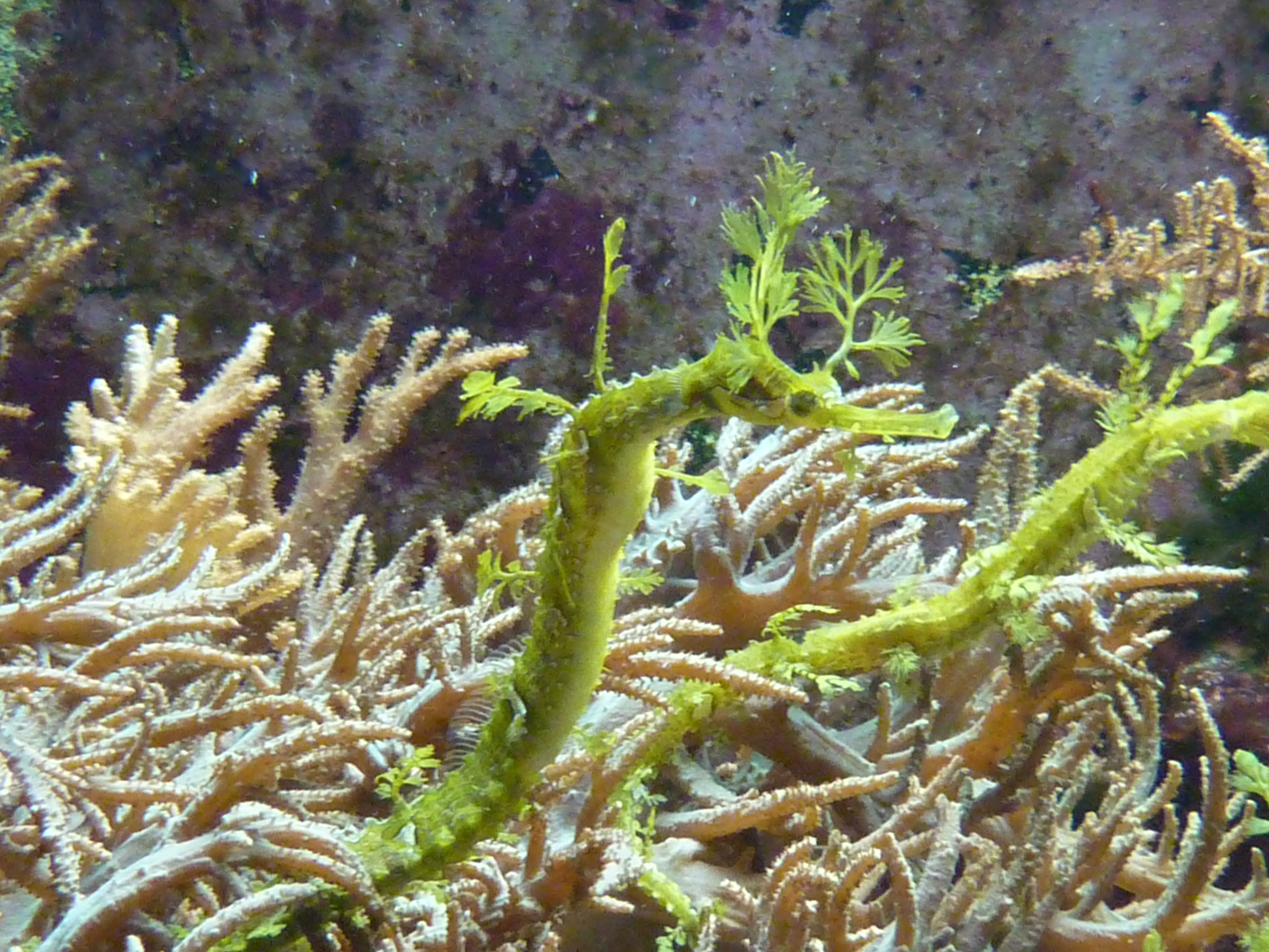 Seepferdchen im Aquarium der Wilhelma